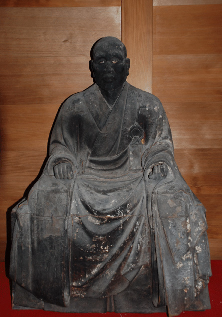 伝島津忠昌木像